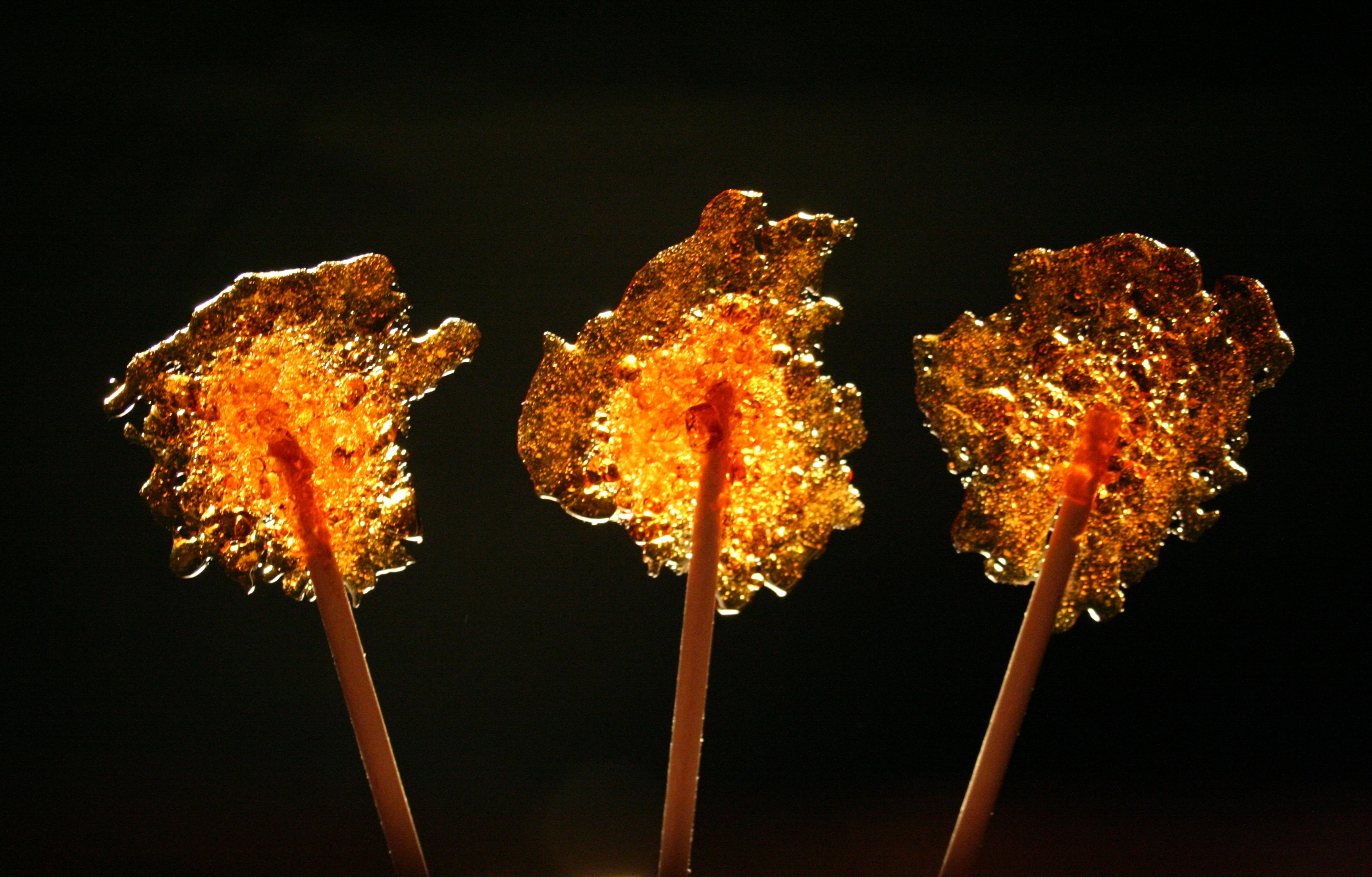 Brausender Curry Lolli